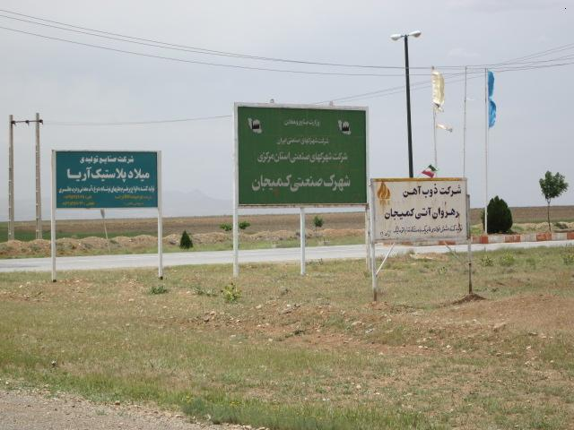 شهرک صنعتی کمیجان در کیلومتر 5 جاده همدان قرار دارد